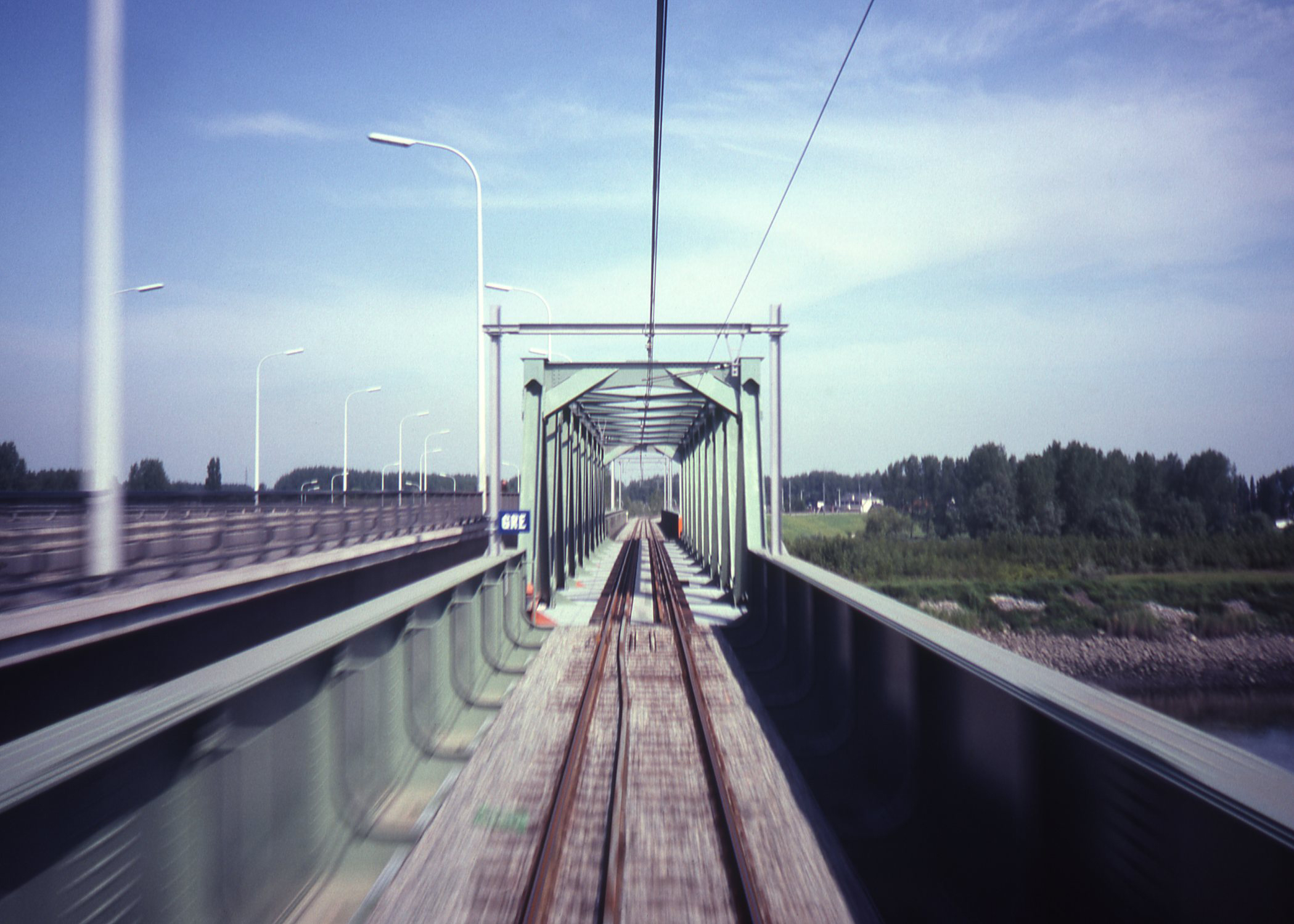 De spoorlijn Lokeren Dendermonde na elektrificatie. De spoorbrug over de Schelde